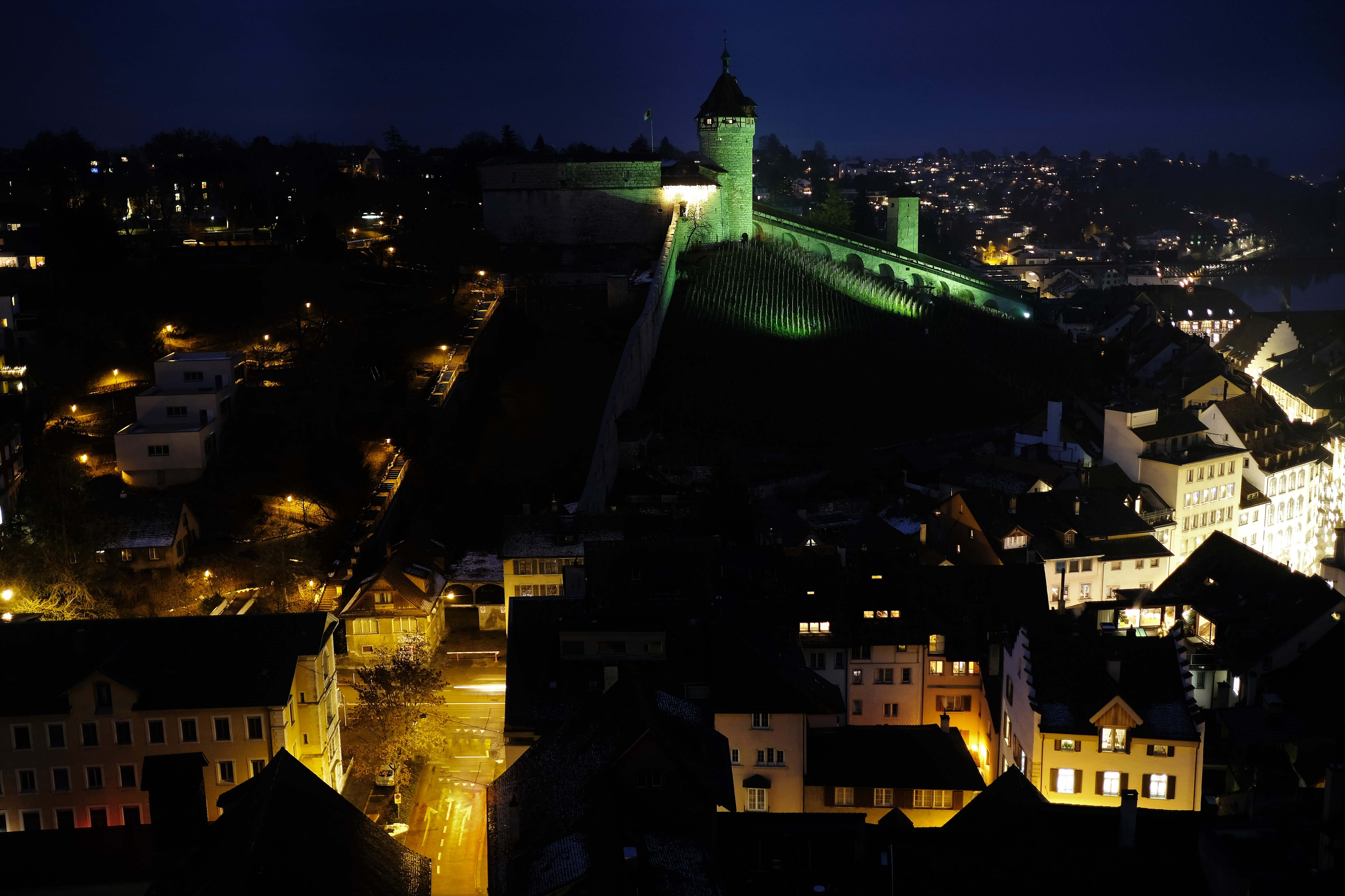 Munot Schaffhausen im Advent 2018, fotografiert aus dem Turm der Kirche St. JohannDas Bild entstand im Rahmen eines Fotokurses.